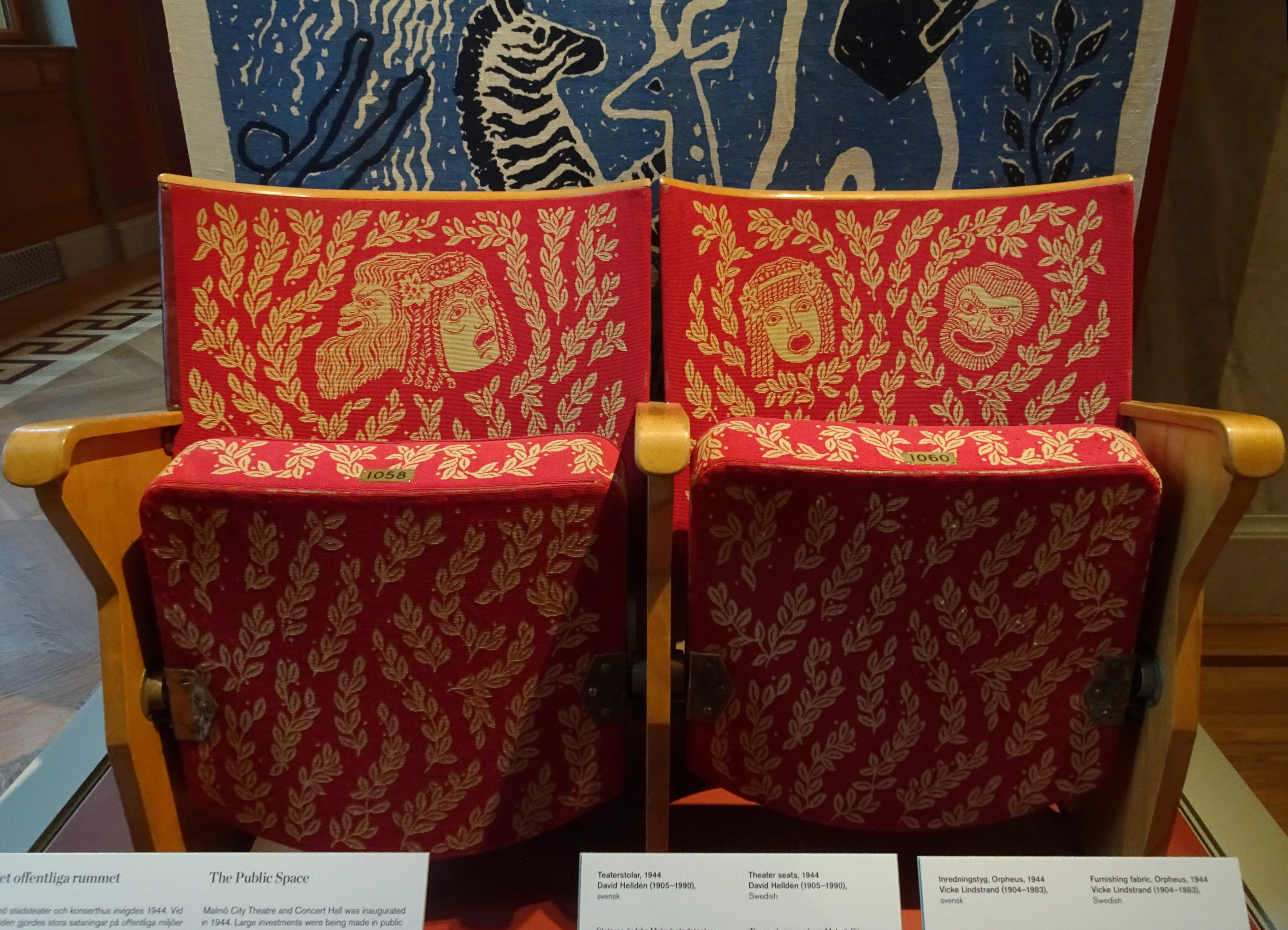 Teaterstolar från Malmö stadsteater, formgivning David Helldén, 1944